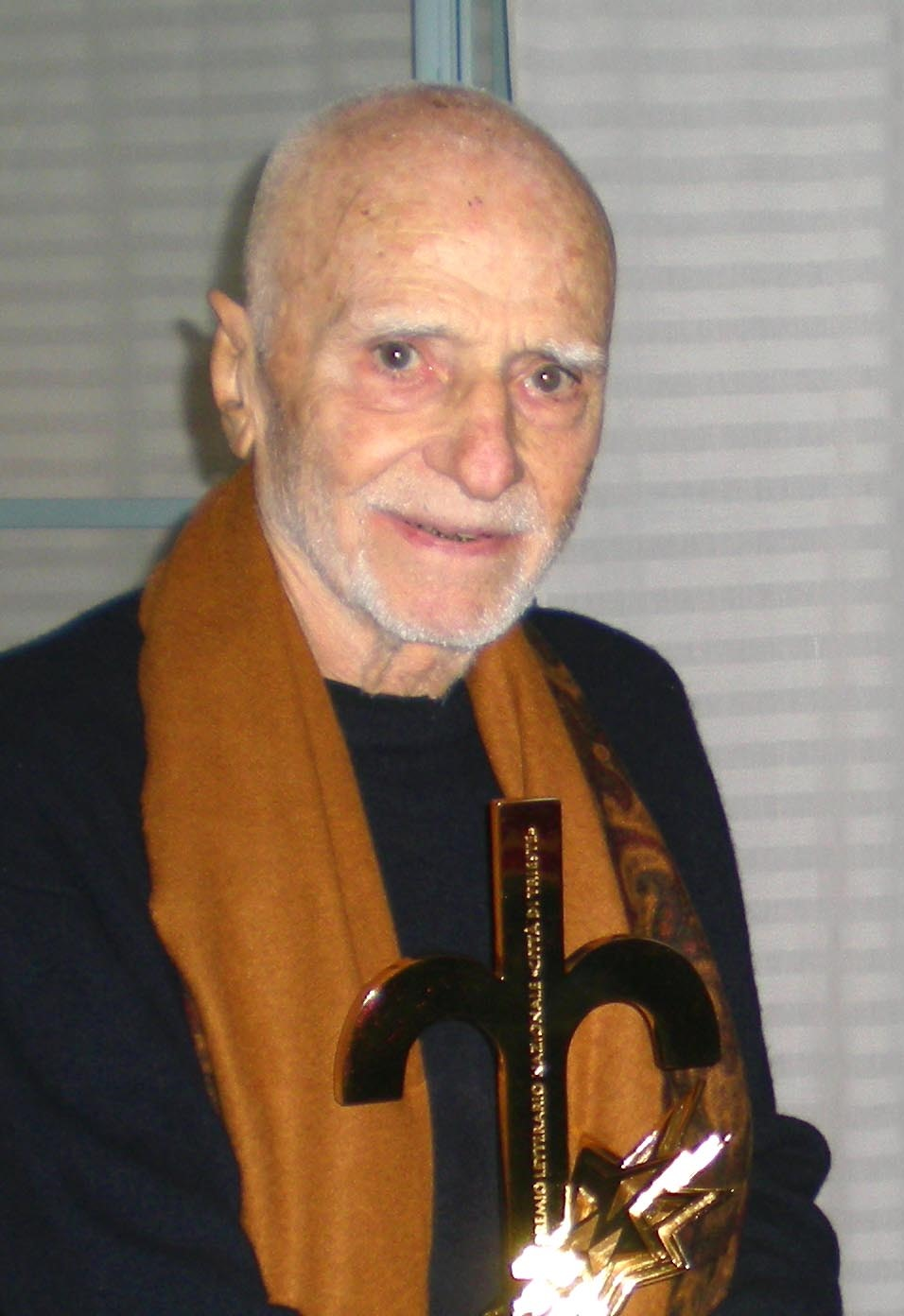 Ritaglio di File:Mario Monicelli - 01.jpg.